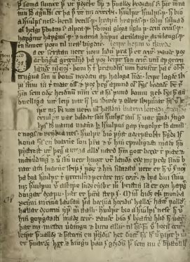 L'une des pages de la Saga d'Erik le Rouge mentionnant la colonisation du site groenlandais de Vatnahverfi par son pèreThorvald Ásvaldsson.